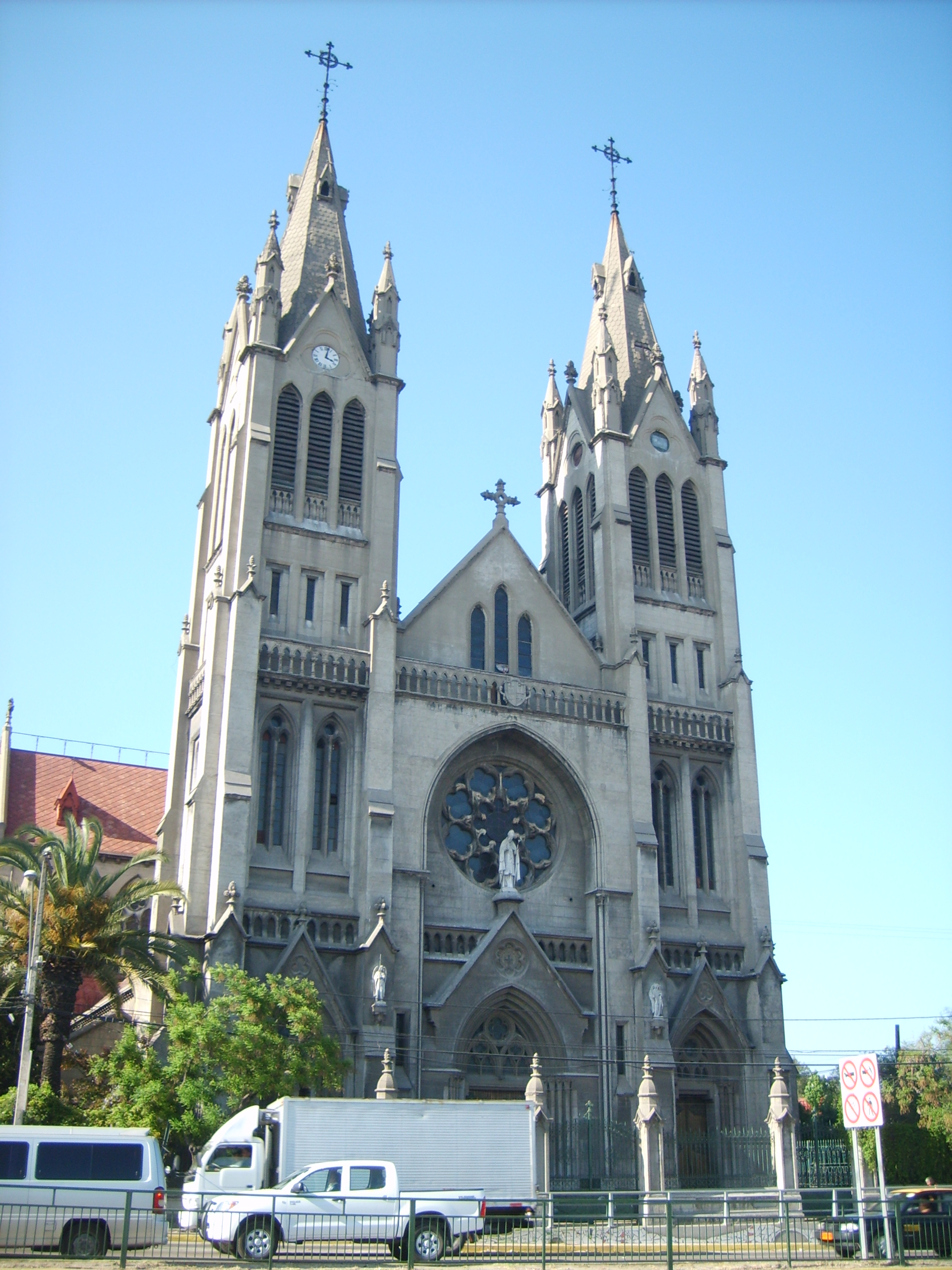 La fachada de la Basílica de Nuestra Señora del Perpetuo Socorro, ubicada en la avenida Almirante Blanco Encalada 2950, Santiago de Chile.